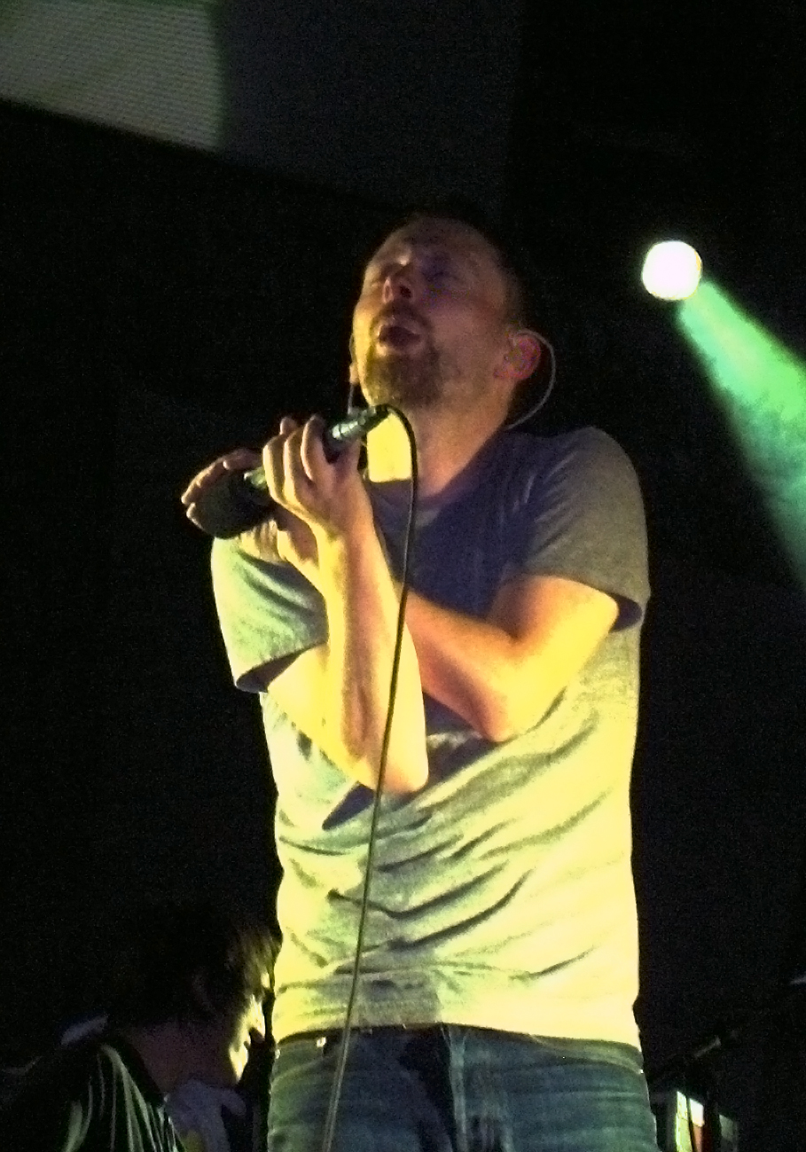 Thom Yorke bei Rock Oz'Arénes in Avenches